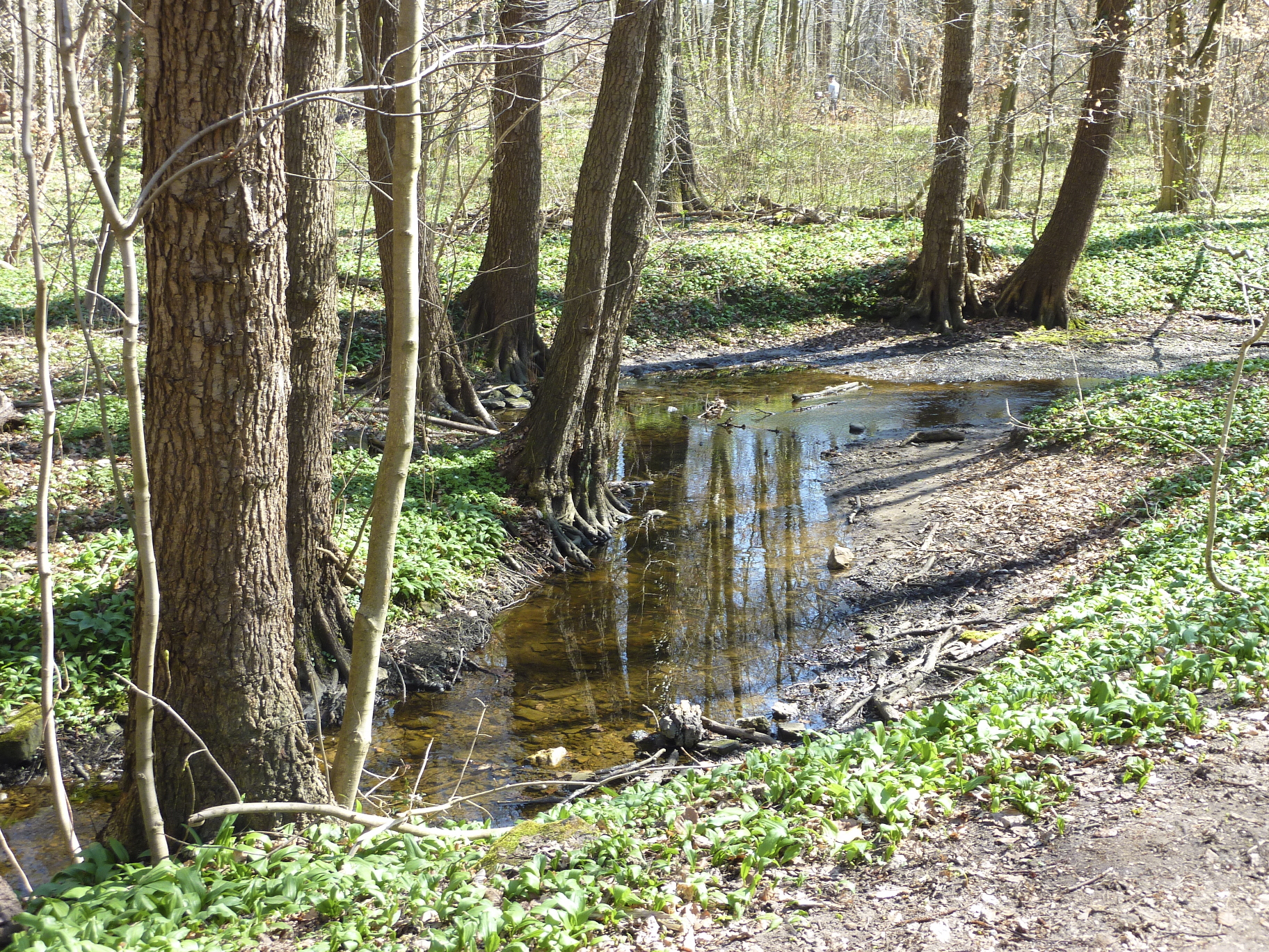 Der Königsbach, im Volksmund auch Luderbach genannt, ist ein 13,7 km langer linker (südlicher) Zufluss des Flusses Main im deutschen Bundesland Hessen. Der Bach entspringt östlich der Stadt Dreieich im Landkreis Offenbach, durchfließt das Stadtgebiet von Neu-Isenburg sowie den Frankfurter Stadtwald und den dort befindlichen Jacobiweiher. Er mündet verrohrt im Stadtteil Niederrad der Stadt Frankfurt am Main. Das Foto zeigt einen Abschnitt des naturbelassenen Bachlaufs im Cleeischen Wäldchen, eine Niederung in der Gemarkung Frankfurt-Sachsenhausen mit dem bedeutendsten und ausgedehntesten Au- und Quellwald-Bestand im Frankfurter Stadtwald